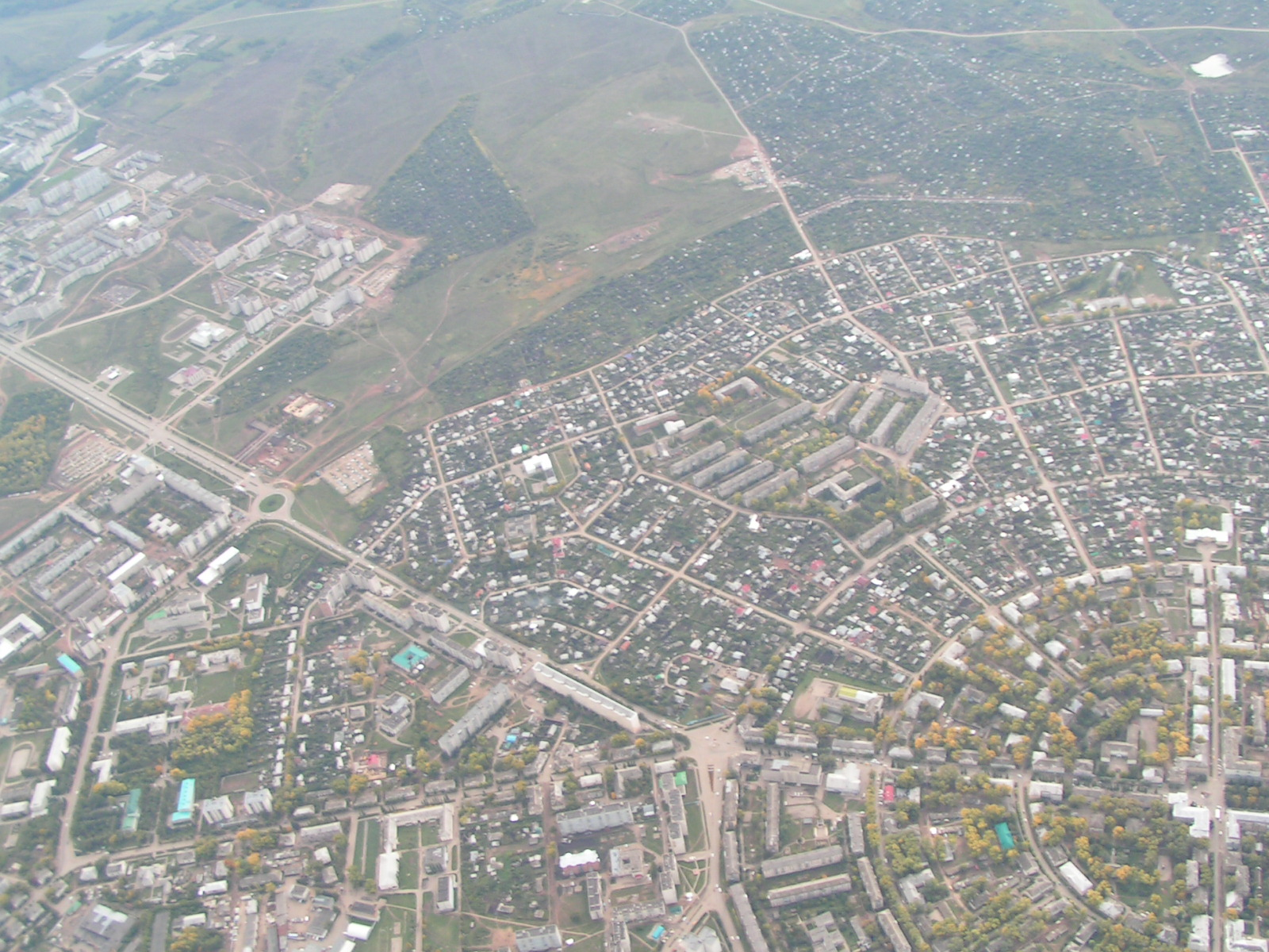 Октябрьский с высоты птичьего полета